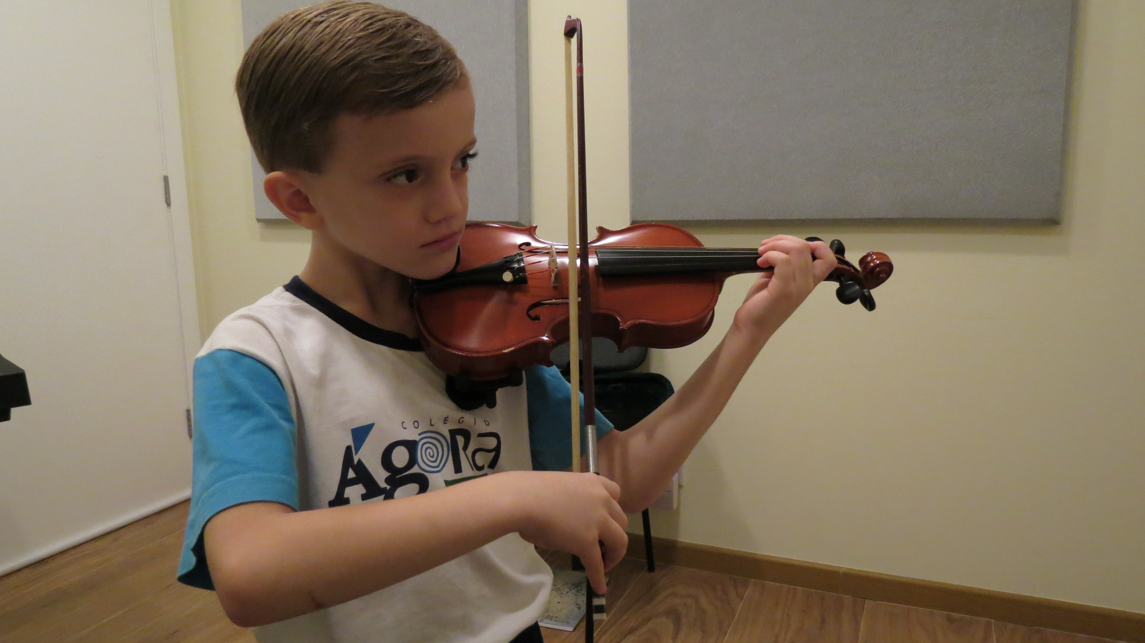 Aula de violino